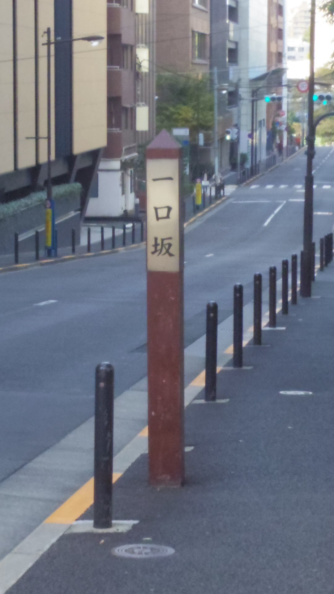 東京都千代田区九段北にある坂、一口坂。